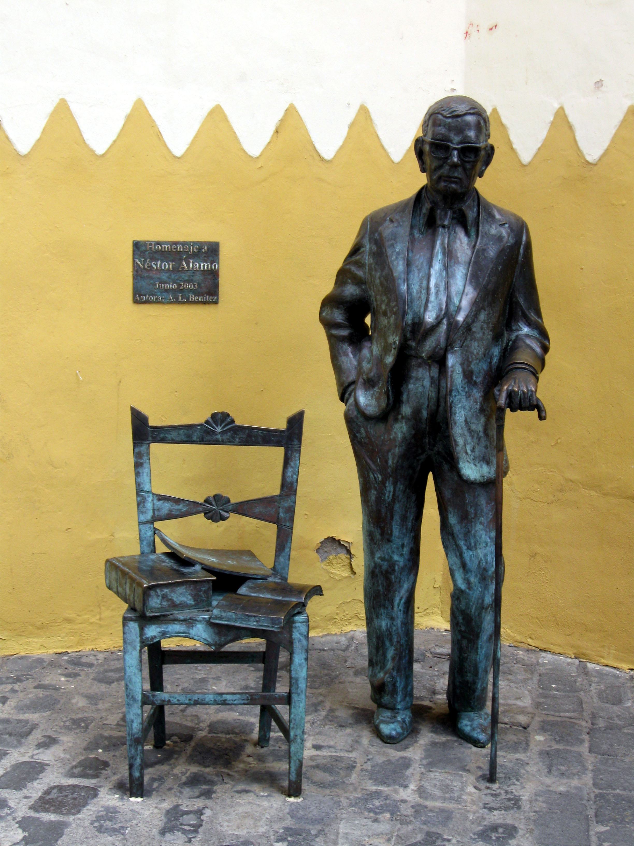 Escultura de Néstor Álamo en el barrio de Vegueta de la ciudad de Las Palmas de Gran Canaria.